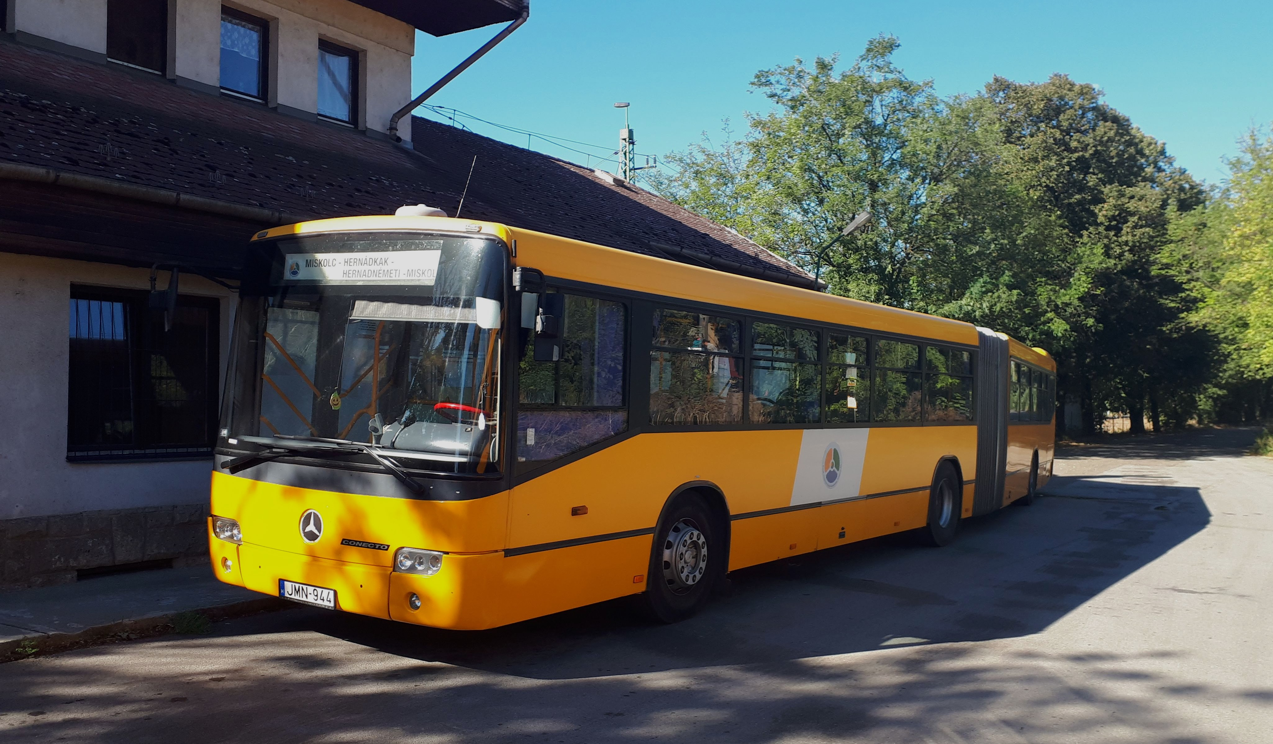 Az ÉMKK JMN-944 rendszámú Mercedes Conecto busza Hernádnémeti-Bőcs vasútállomáson, a 3731-es helyközi járaton.